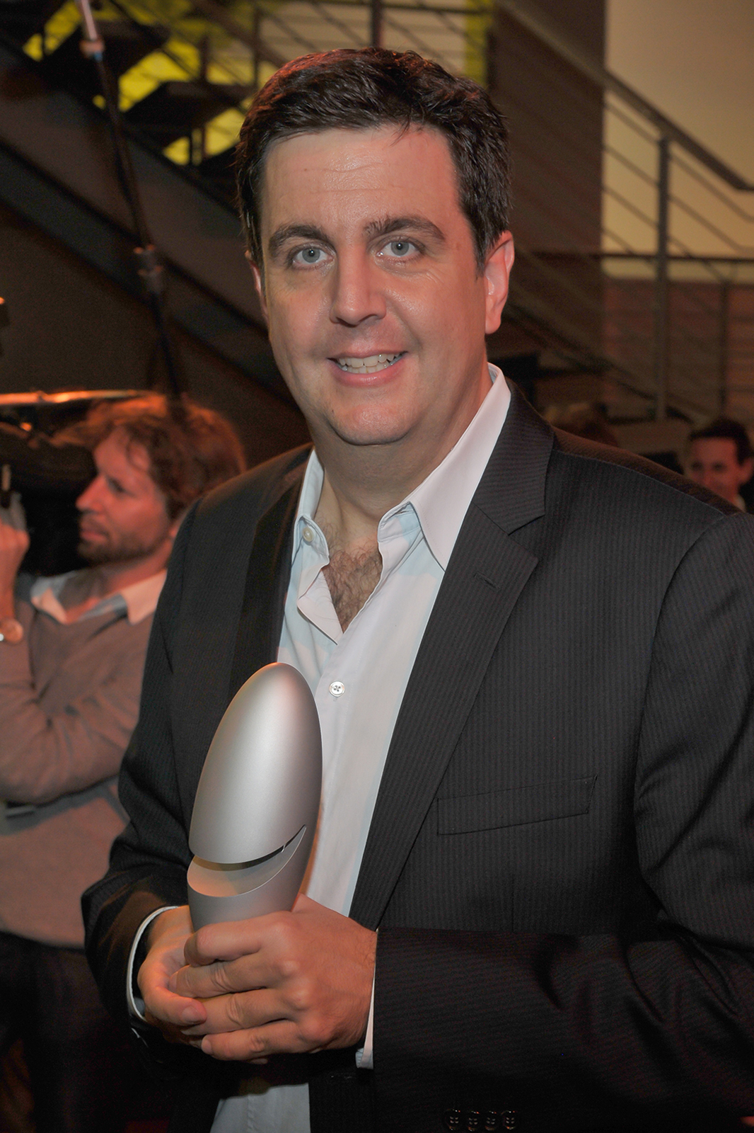 Bastian Pastewka auf dem Deutschen Comedypreis in Köln am 15. Oktober 2013.